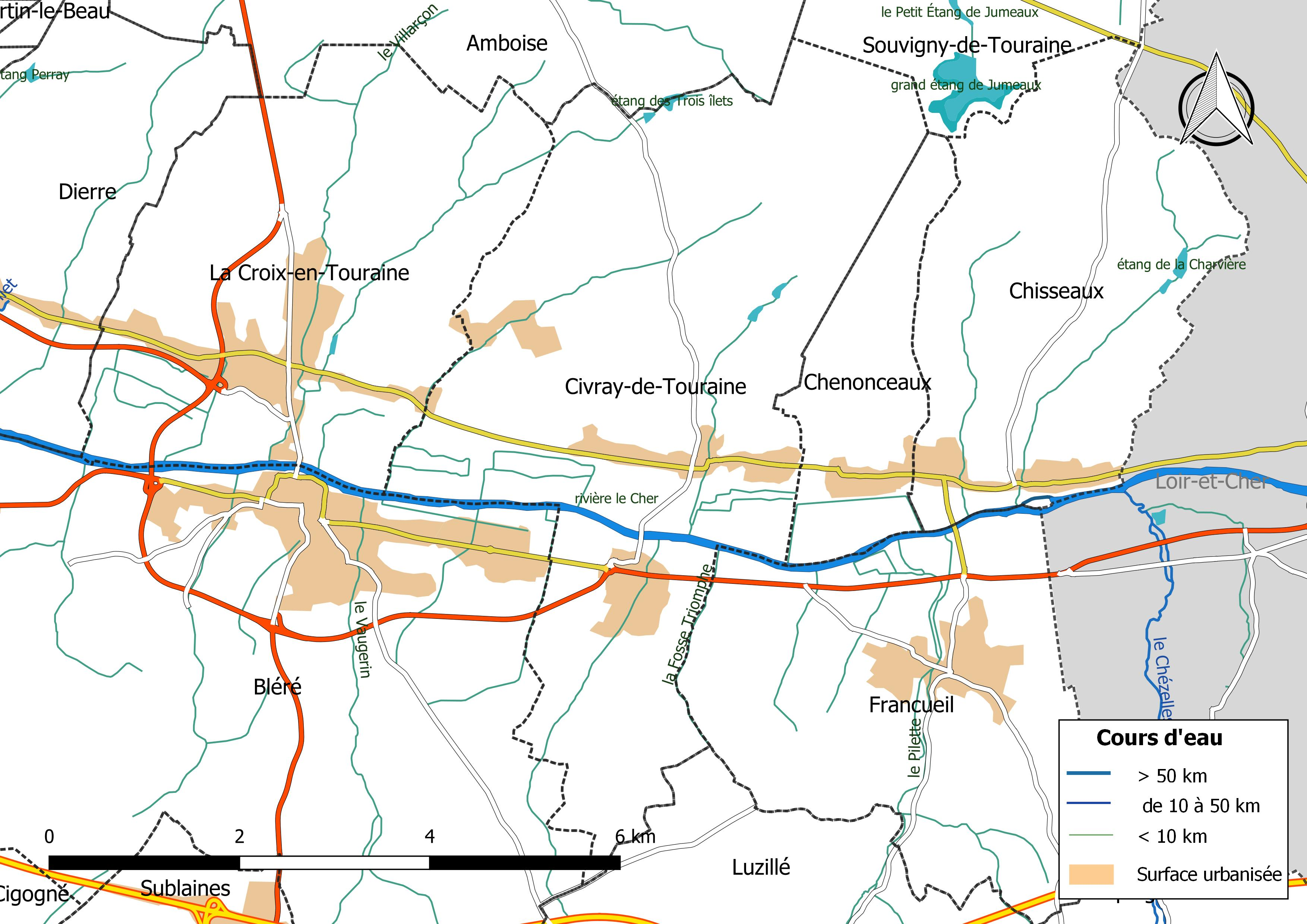 Carte du réseau hydrographique de la commune de Civray-de-Touraine (France).